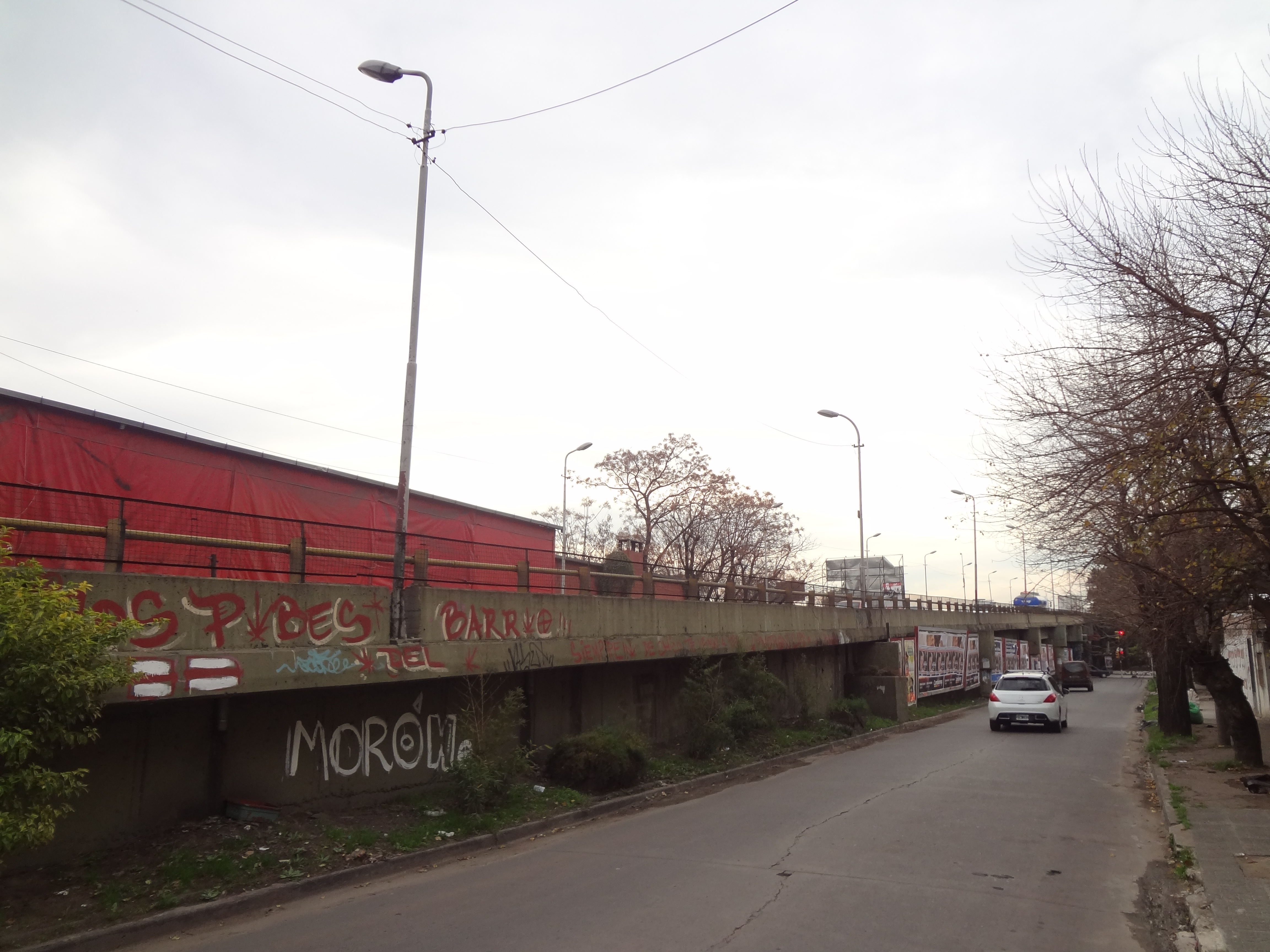 Puente Lebensohn, subida lado sur. Morón